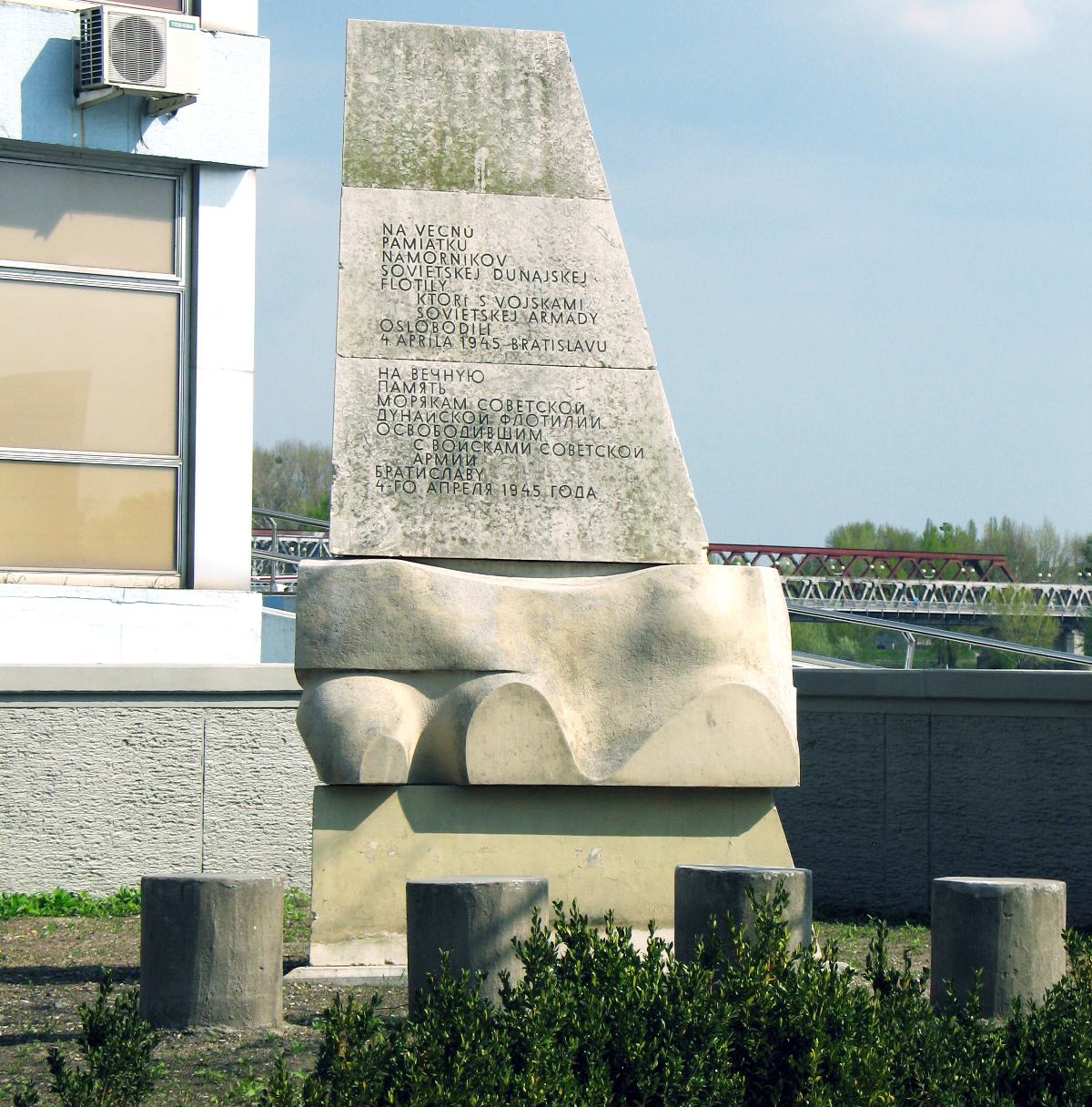 Pamätník sovietskej dunajskej flotile